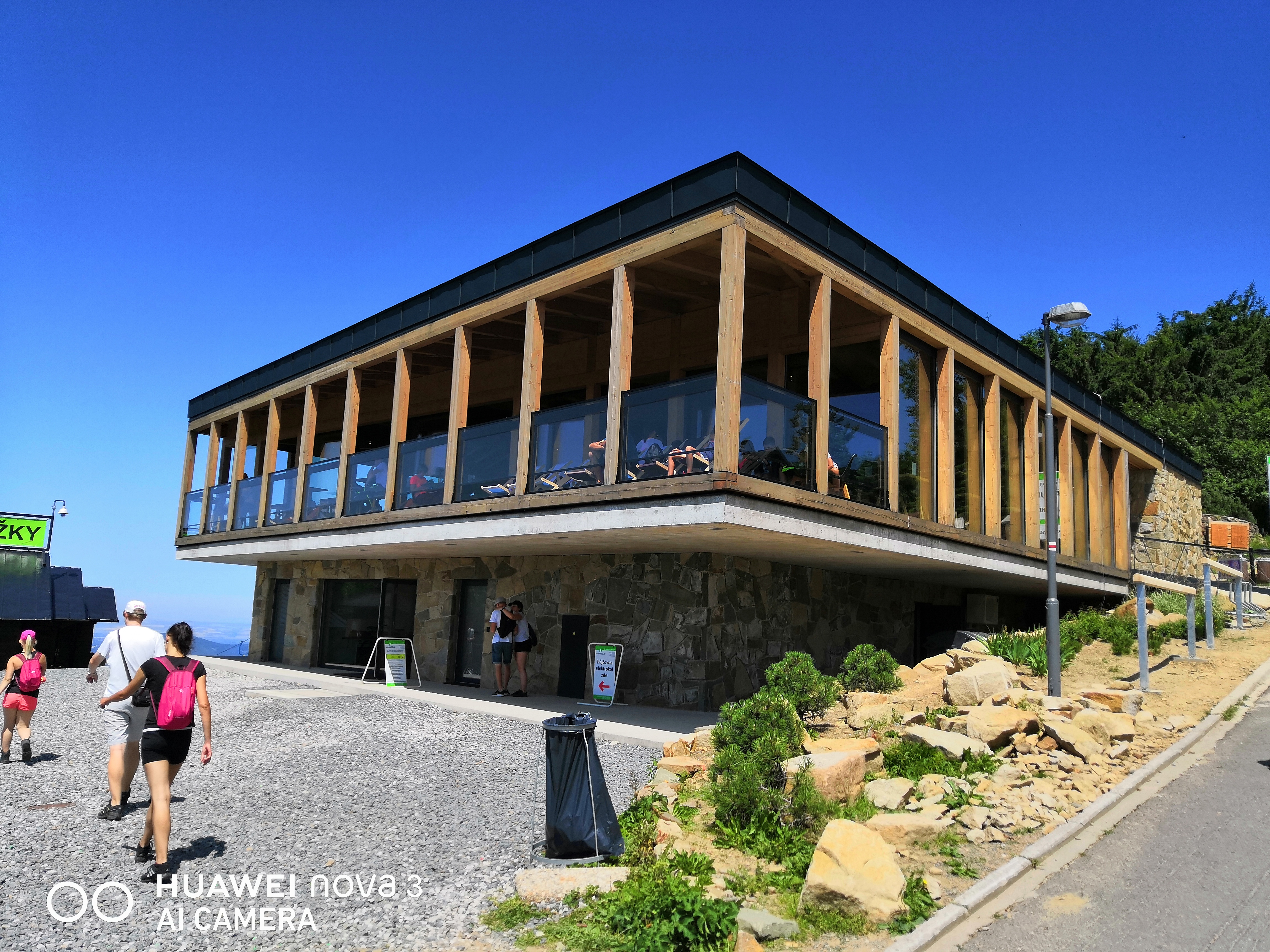 Nová horní budova lanové dráhy s restaurací, která byla otevřená v létě roku 2017